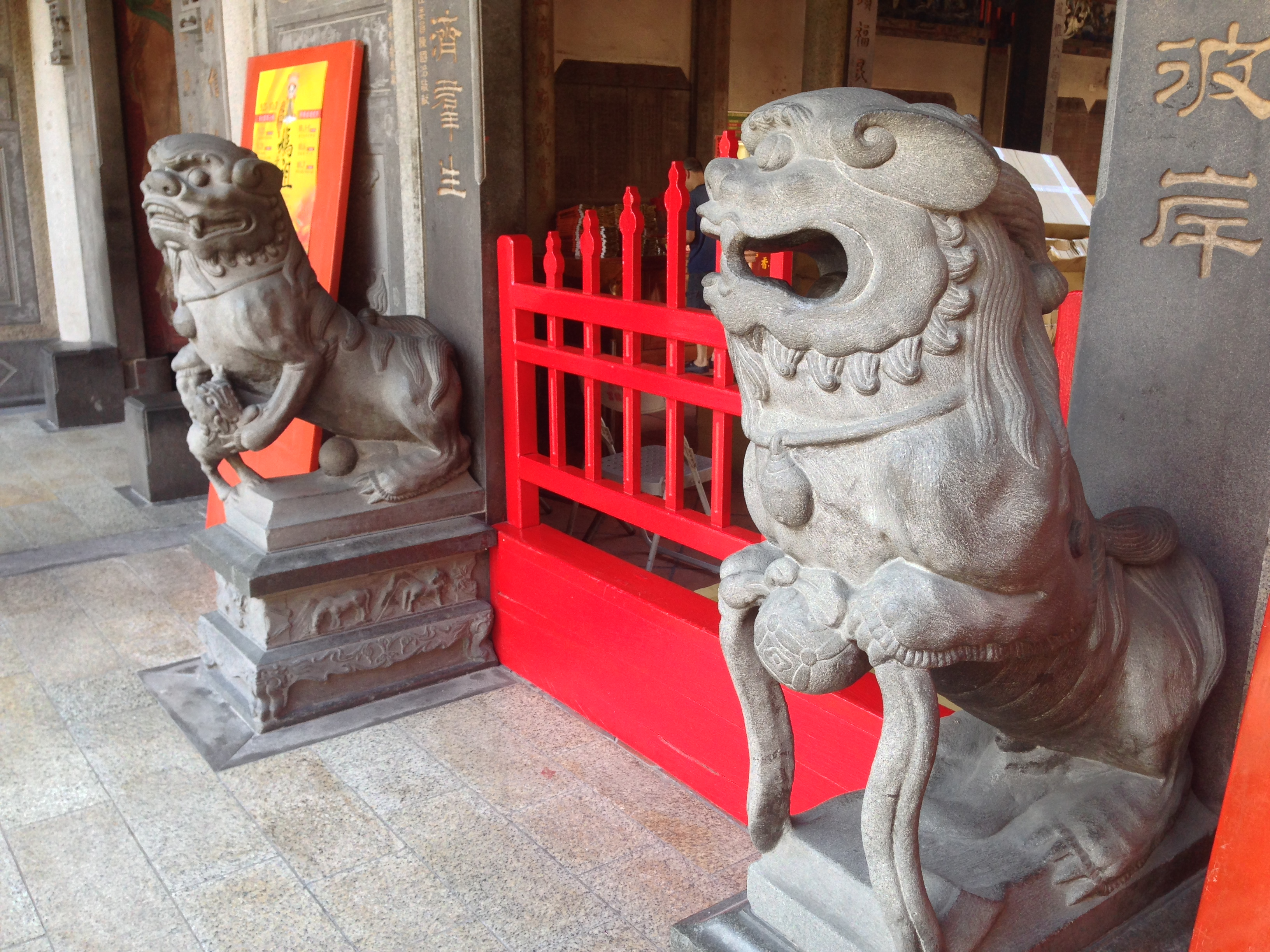 中文（台灣）: 新莊慈祐宮石獅